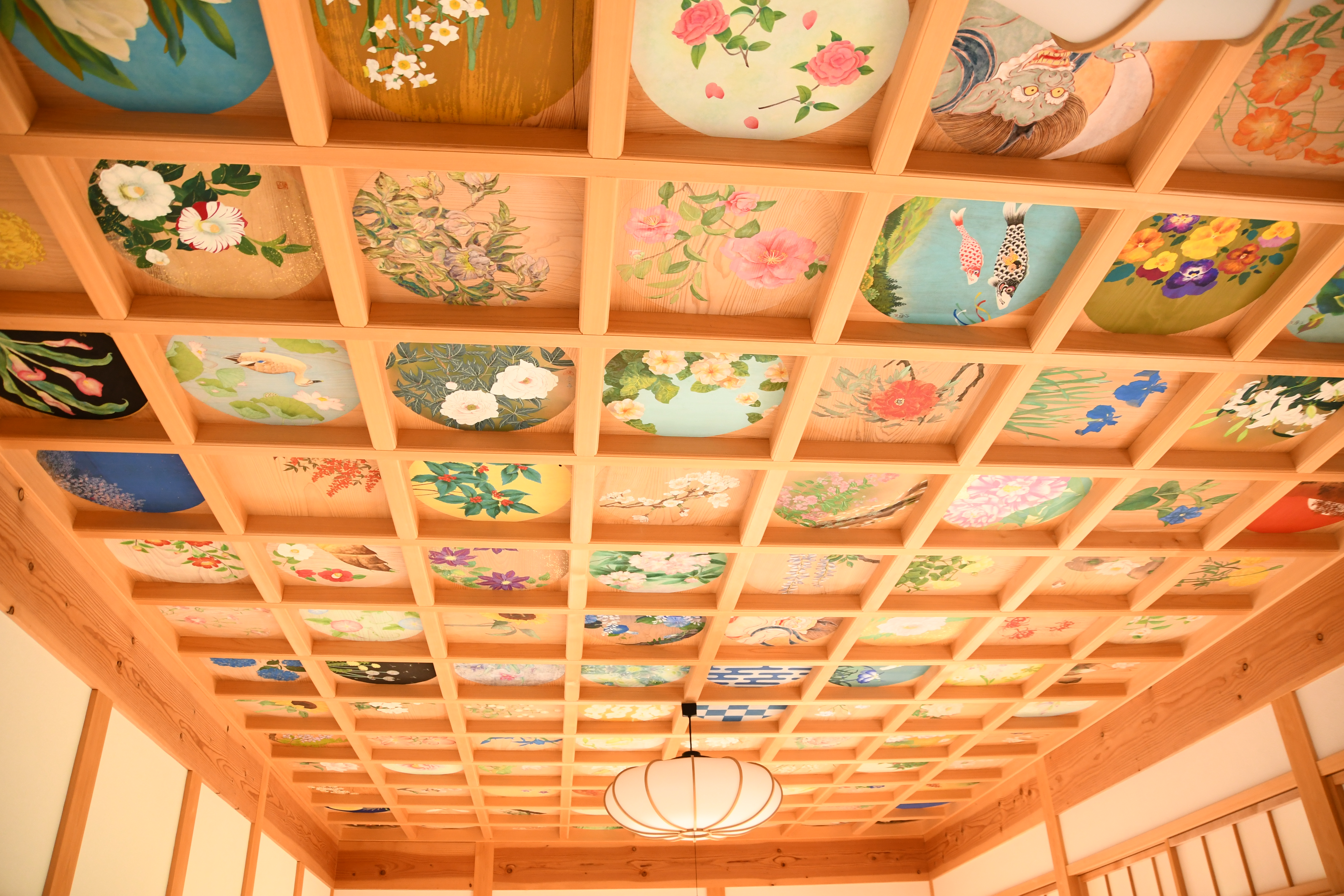 京都府宇治田原町奥山田 正寿院 客殿（則天の間） 天井画。2018年8月11日撮影。